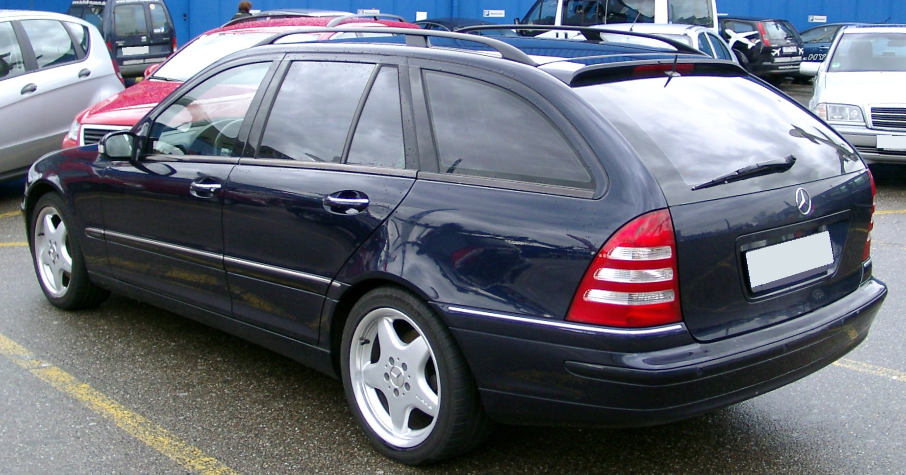 Mercedes-Benz S203 (T-Modell)